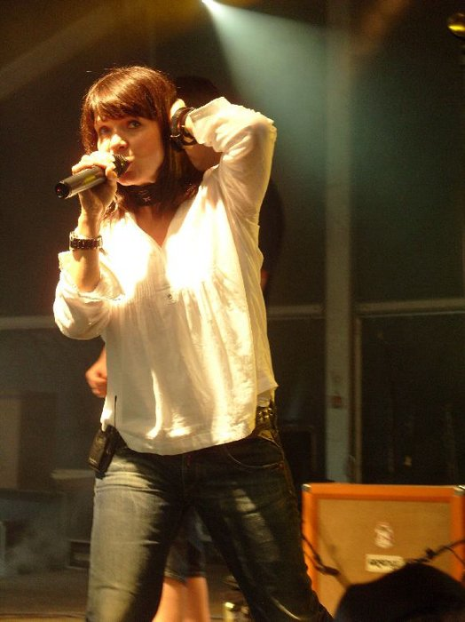 Anna K na Rock for People 2008